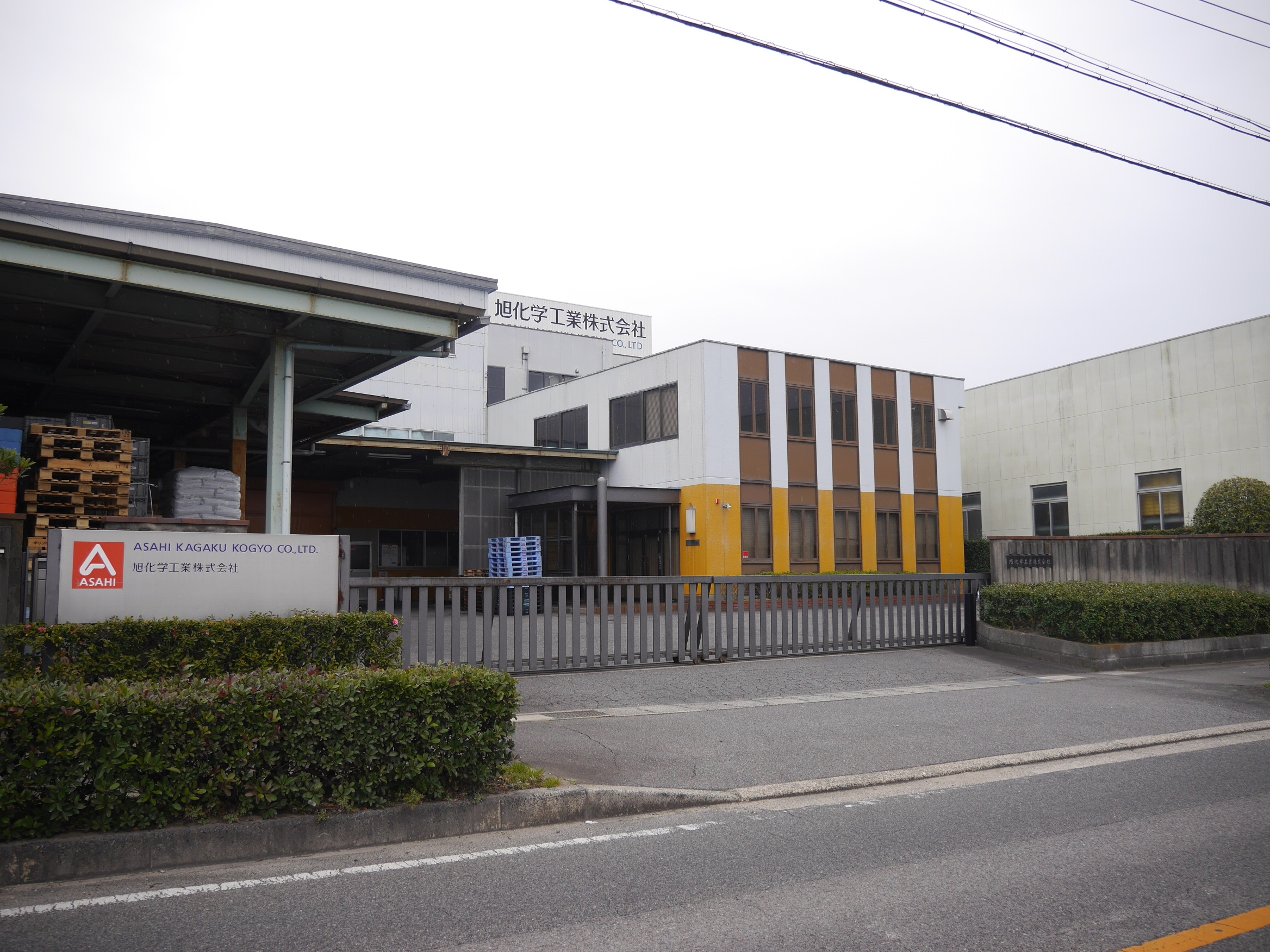 愛知県安城市の旭化学工業本社工場 ３月3日撮影